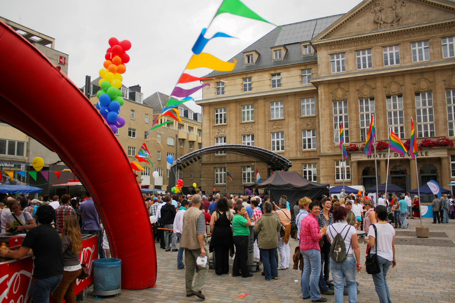 Sujet: Foto vum Gaymat-Festival 2011 Auteur: User:JimHawk Source: Eege Foto Lizenz: CC-BY-SA-3.0-LU.